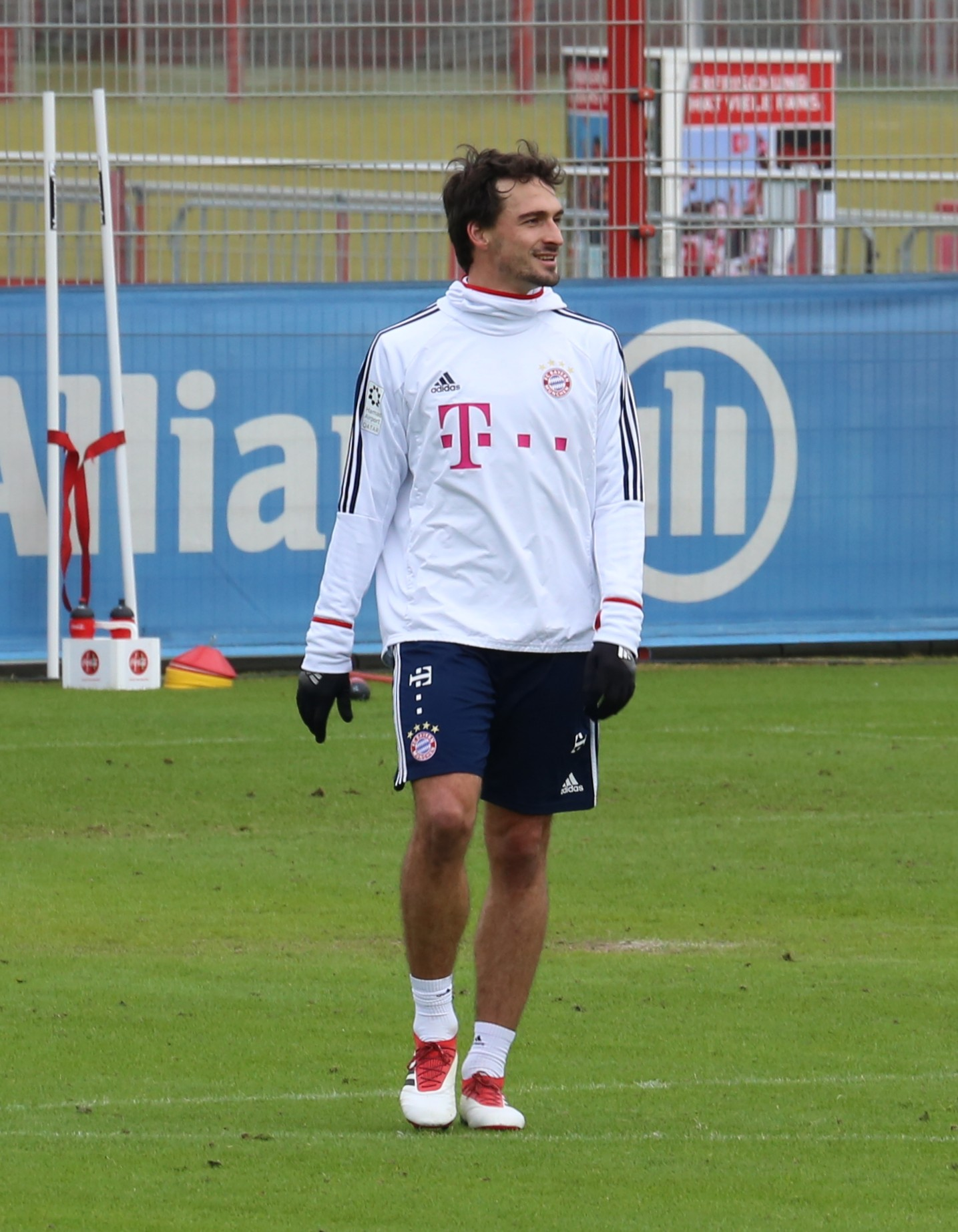 Mats Hummels beim Training auf dem Gelände des FC Bayern München (Januar 2018)